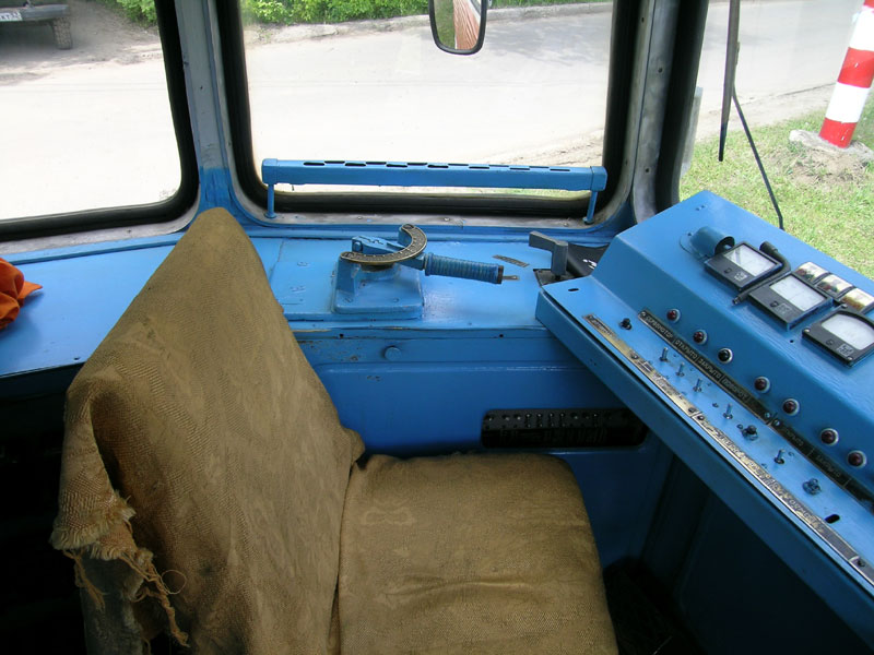 Ручка управления контроллером трамвайного вагона 71-605 (КТМ-5).